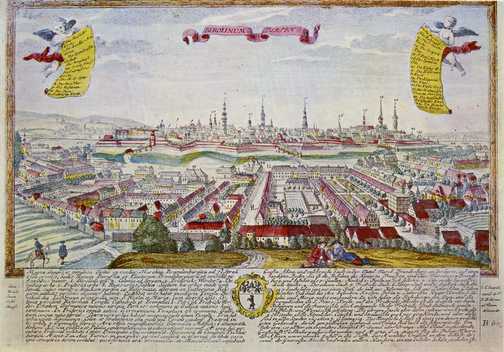 Die Ansicht zeigt im Vordergrund die um 1690 erbaute Friedrichstadt und im Hintergrund Berlin und Cölln mit den alten Befestigungswerken, welche ab 1734 nach und nach abgetragen wurden.